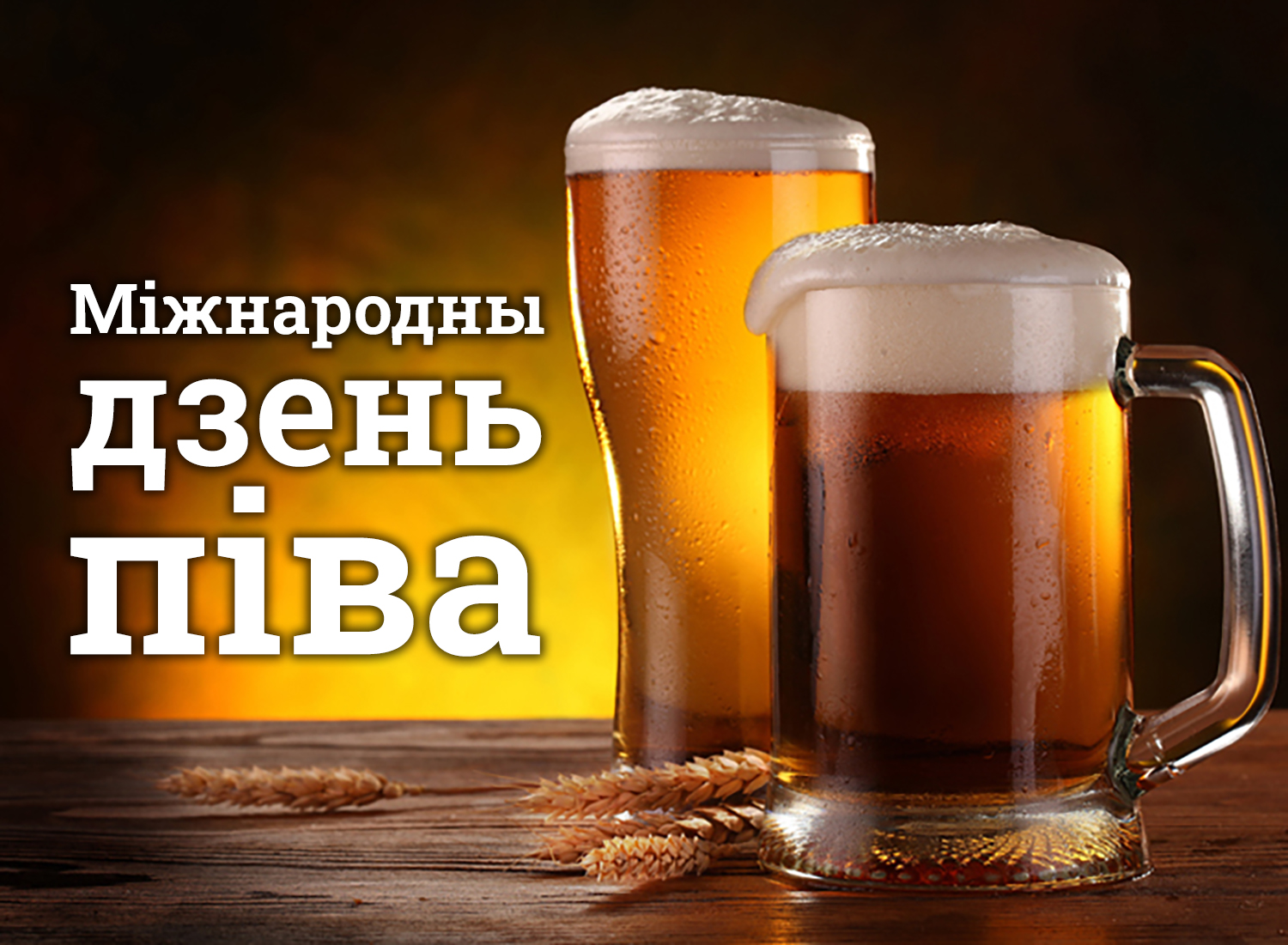 Беларуская (тарашкевіца): Дзень піва